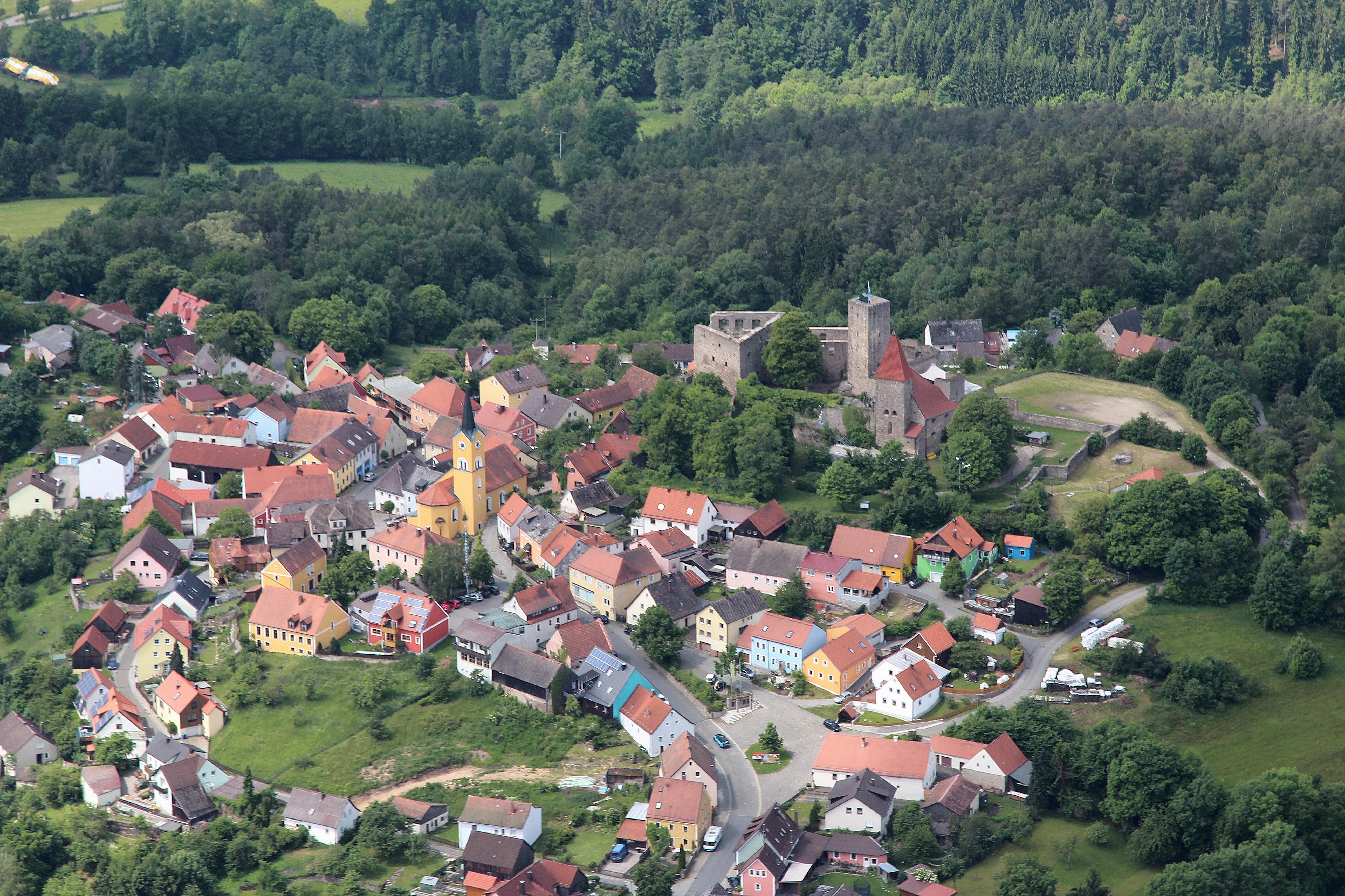 Ortschaft Leuchtenberg mit Burgruine Leuchtenberg, Landkreis Neustadt an der Waldnaab, Oberpfalz, Bayern (2014)